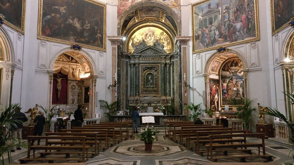 Santa Maria della Pace, Rom. Bick zum Hauptaltar.